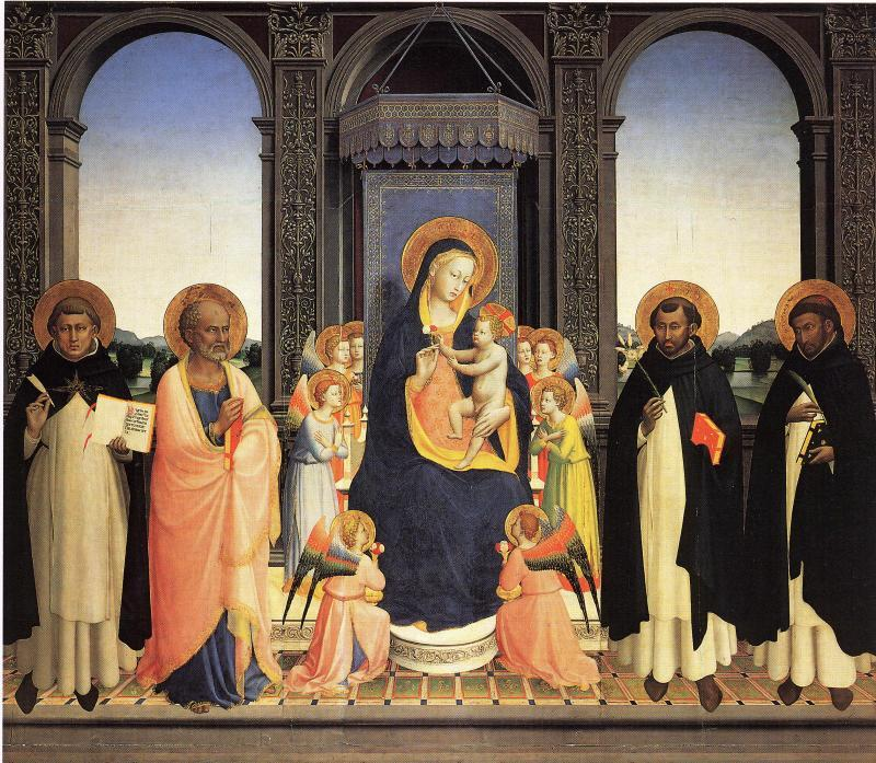 Fiesole Altarpiece